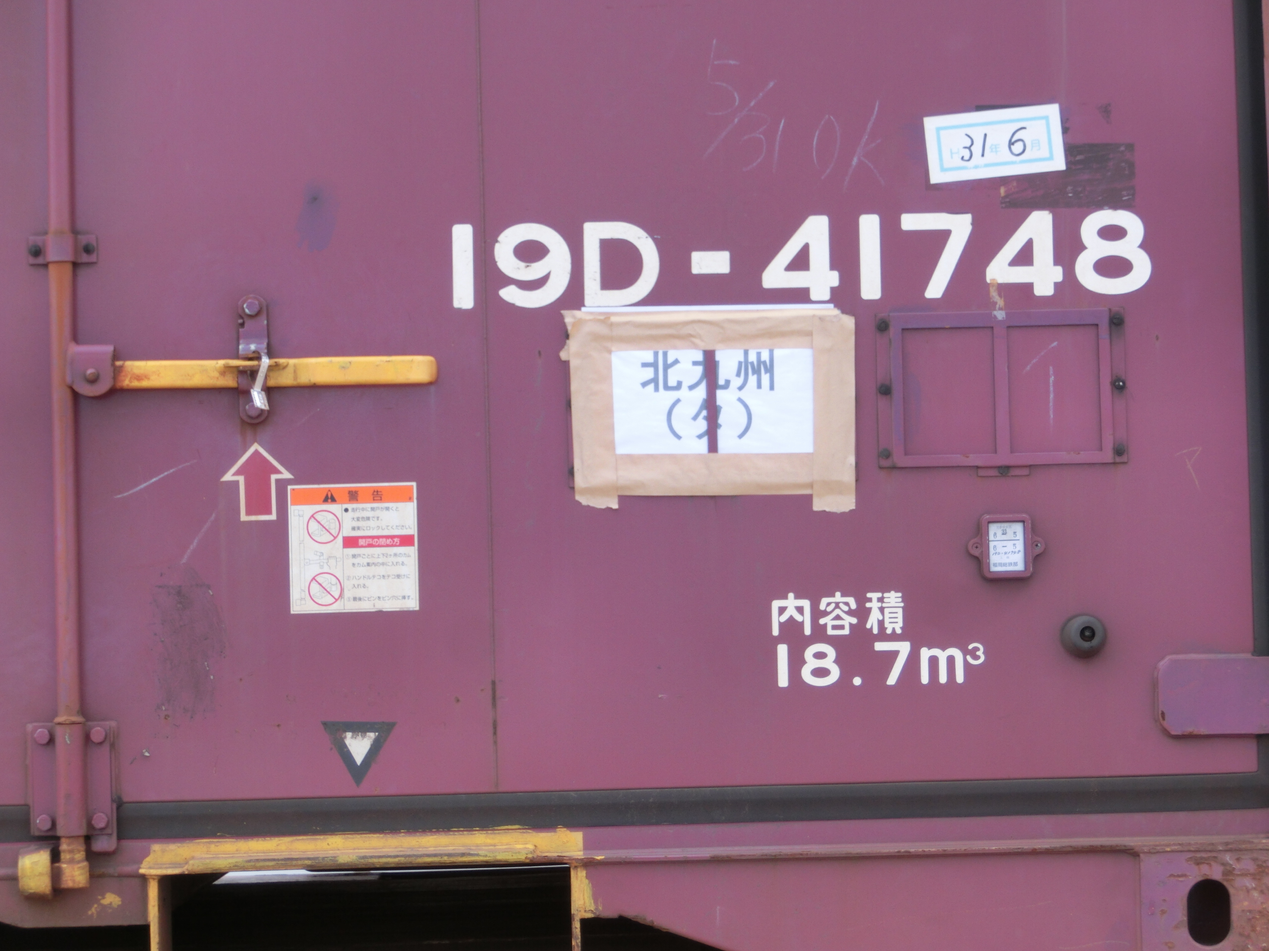 三度目の移転で広大な敷地と、完全に隔離され夜間留置の安全性が高まった岡山市東区にある 「 岡山新港高島埠頭 」 で、JR貨物所有の12ft形コンテナを船舶代行輸送する風景。 停泊している内航船で、北九州港へ一日一往復していた。 内航船の横に設置されたクレーン車で吊り作業を行い、コンテナの敷地内の移動は、二台の10t級フォークリフトで行う。 ＝＝＝＝＝＝＝＝【 総 括 】＝＝＝＝＝＝＝＝ 2018年 ( 平成30年 ) 7月5日 ( 木 ) から岡山県や広島県及び、山口県内の各地で発生した 「 平成３０年７月豪雨 」 の影響により、三県内の山陽本線で複数個所において、線路喪失を含む大規模な輸送障害が三ヶ月以上にわたり発生した。 これに伴い、元々岡山県内の拠点となっている 「 JR貨物岡山(タ) 」 が今回の輸送障害区間では、事実上の東側の終着点駅となり、この影響で福山通運の30ftコンテナのみを一列車貸切っている 「 福山レールエクスプレス号 」 積載の全コンテナを始め、全国からの九州地区向けの大口宅配や冷凍などで大量に扱われていた20ft及び、30ftの大型コンテナを全て 「 岡山(タ) 」 で臨時に取り扱うこととなった。 「 岡山(タ) 」 ではこれらの大型コンテナを最優先輸送させる為に、広島や山口へのトラック代行輸送する臨時便が一気に集中し、荷役能力の逼迫となってしまった。 また岡山県内の水島臨海鉄道の拠点コンテナ駅である 「 東水島駅 」 への関東からの定期列車は、本来はこの 「 岡山(タ) 」 で一部のコンテナの取り卸と、機関車を付け替えてから 「 東水島駅 」 へ中継輸送していたので、この関東便に関してはさほど問題は無かったが、 通常の 「 東水島駅 」 から 「 岡山(タ) 」 で中継して九州向けのルートが絶たれてしまった。 この打開策として、 「 東水島駅 」 ～ 九州向けの入出荷ルートと、近隣の 「 姫路貨物駅 」 や 「 神戸(タ) 」 での置き去り気味で滞留し続ける12ft形5tコンテナ （ 私有コンテナを除く ） の輸送を確保するために、船舶を利用した 「 災害時の鉄道代行輸送 」 ルートとして、中国地区としては初めてとなる福岡県 「 北九州港 」 までの船舶輸送が始まった。 担当港は、「 東水島駅 」 の最寄港となる 「 水島港 」 を利用すれば一番効率もよく、また駅から港までの輸送費も抑えられるが、当初予想されていた約四ヶ月もの期間を一貫して使用できる用地の確保する見通しがたたず、緊急暫定的処置として、初日の7月18日 ～ 約一週間程度の短期間を、地元の水島港 （ 実地港区は不明 ） で取り扱うこととなった。 7月下旬からは、荷役埠頭敷地や荷役設備の受け入れ準備が整った、東水島駅から陸路で約30キロ離れた岡山市南区の 「 岡山港福島埠頭 (ゲートも無く出入り自由地区) 」 で、8月31日までの期限付きで着地港の変更無く 「 水島港 」 から引き継がれてた。 更に9月1日からは、積み残しや陸路の輸送待ちで安全に夜間でも留置できる設備の確保として、荷役埠頭がフェンスで完全に区画管理されて専用使用できる、陸路で約三キロ離れた河口対岸の岡山市東区にある 「 岡山新港高島埠頭 」 へ、再度移転して一連の代行輸送が最終日となる、9月28日の下り便の出航まで続いていた。